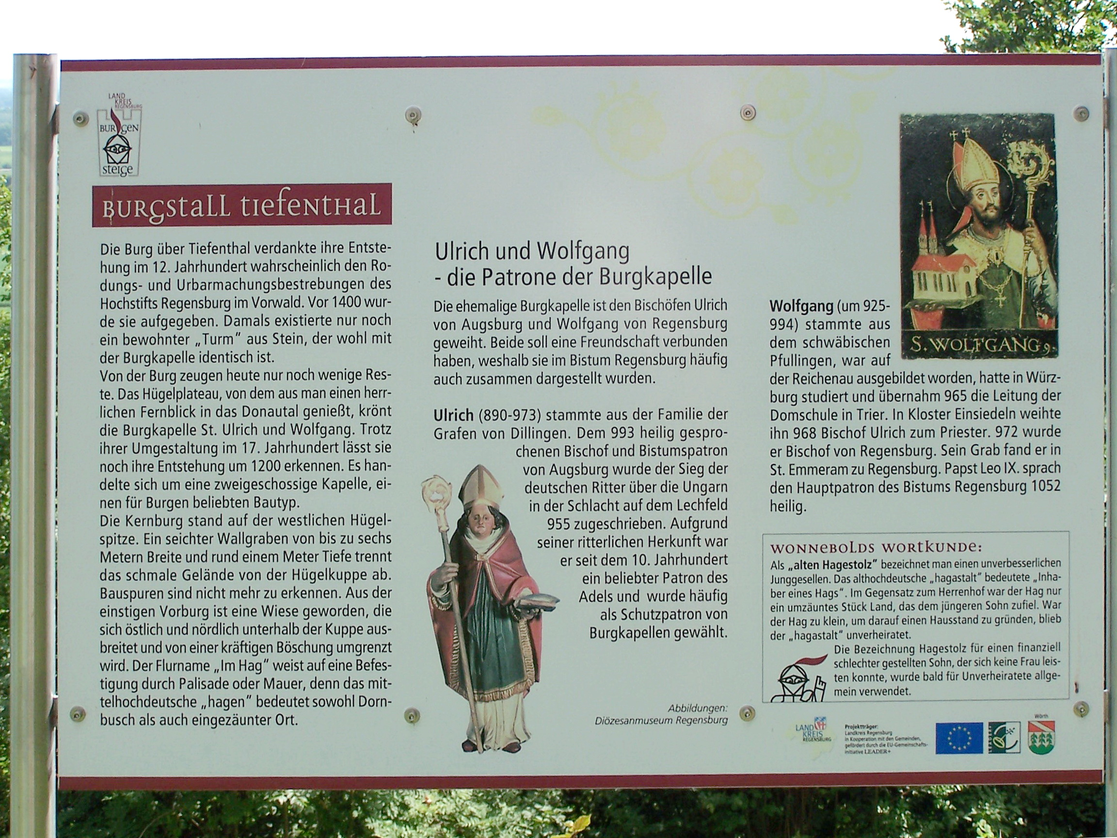 Wörth an der Donau. Tiefenthal. Infotafel neben der Kirche St. Ulrich und Wolfgang.